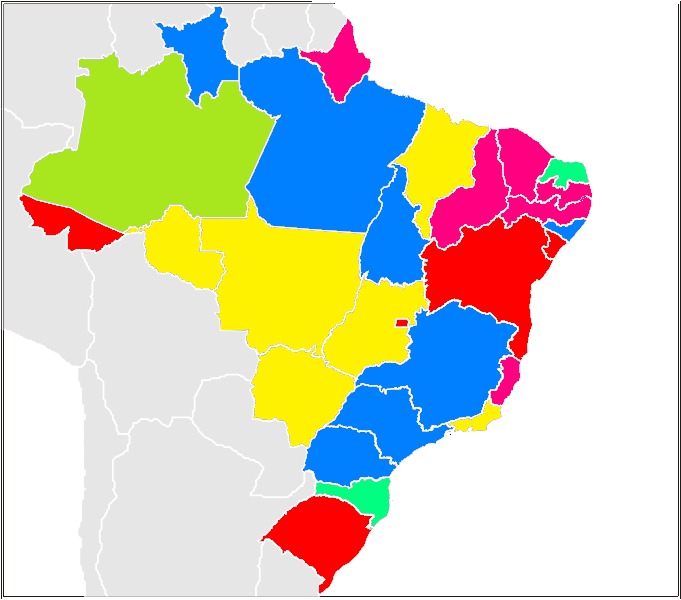 Estados do Brasil com cor segundo o partido que consegiu elegir o governador em 2010.